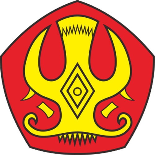 Ini merupakan logo resmi dari Universitas Tadulako Palu